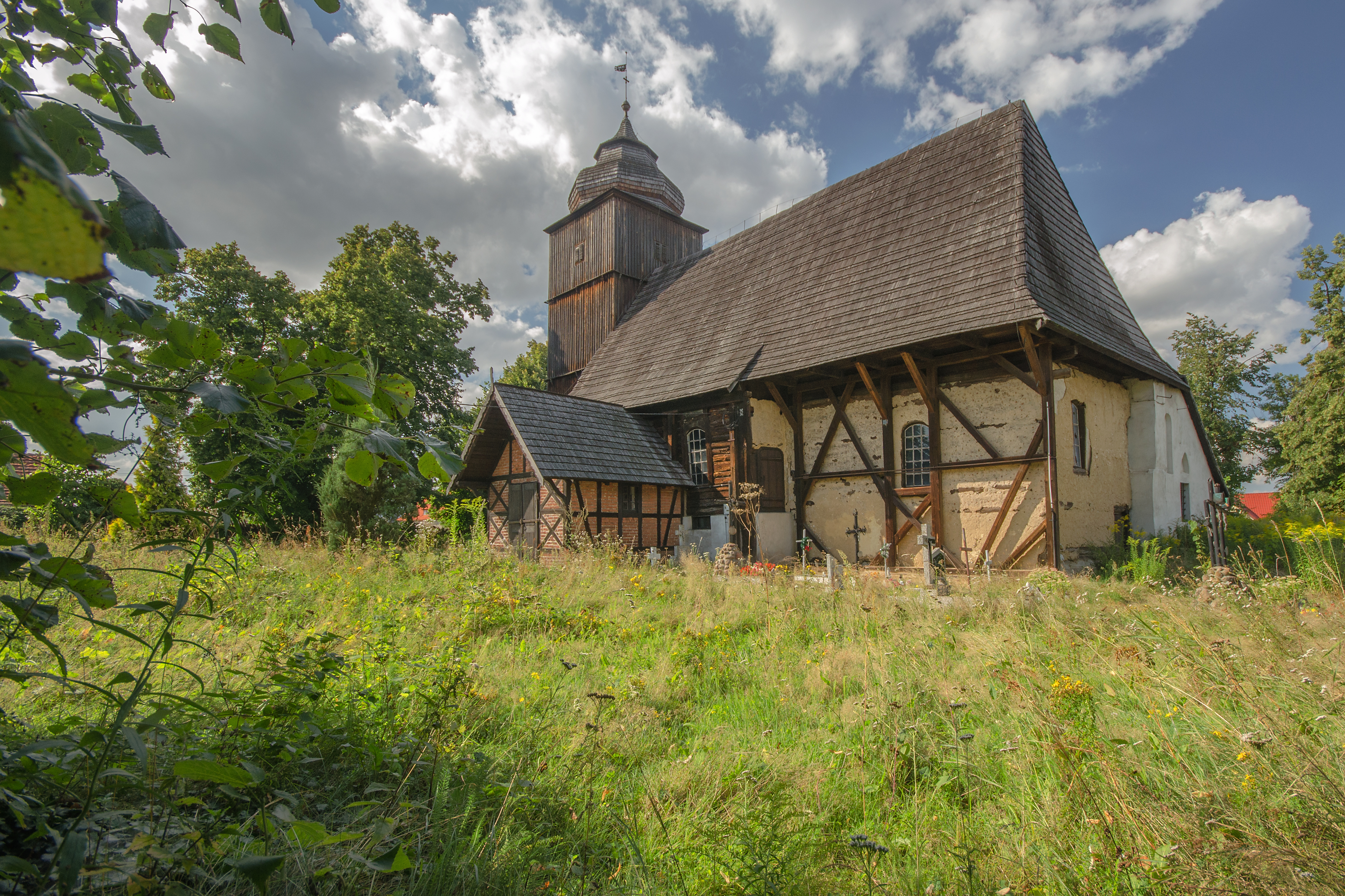 Obórki, kościół ewangelicki, ob. kościół polsko-kat. p.w. śś. Piotra i Pawła, XVII, 1755